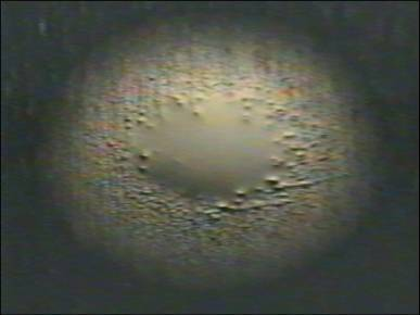 Radiales Breitlaufen eines Schmierstoffes auf Stahl